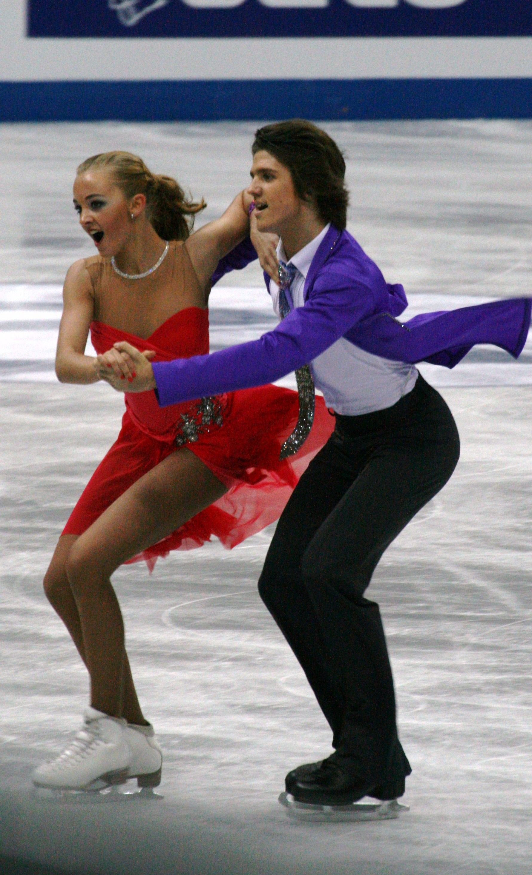 Александра Степанова и Иван Букин (Россия) на финале Гран-при среди юниоров 2012-2013. Короткий танец.